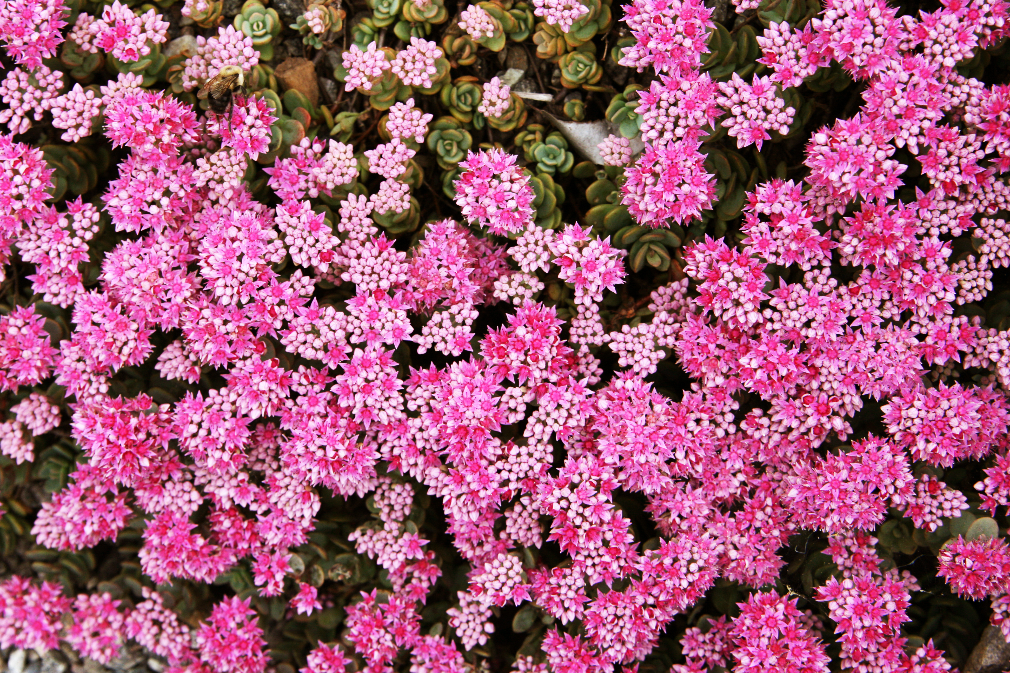 Magenta